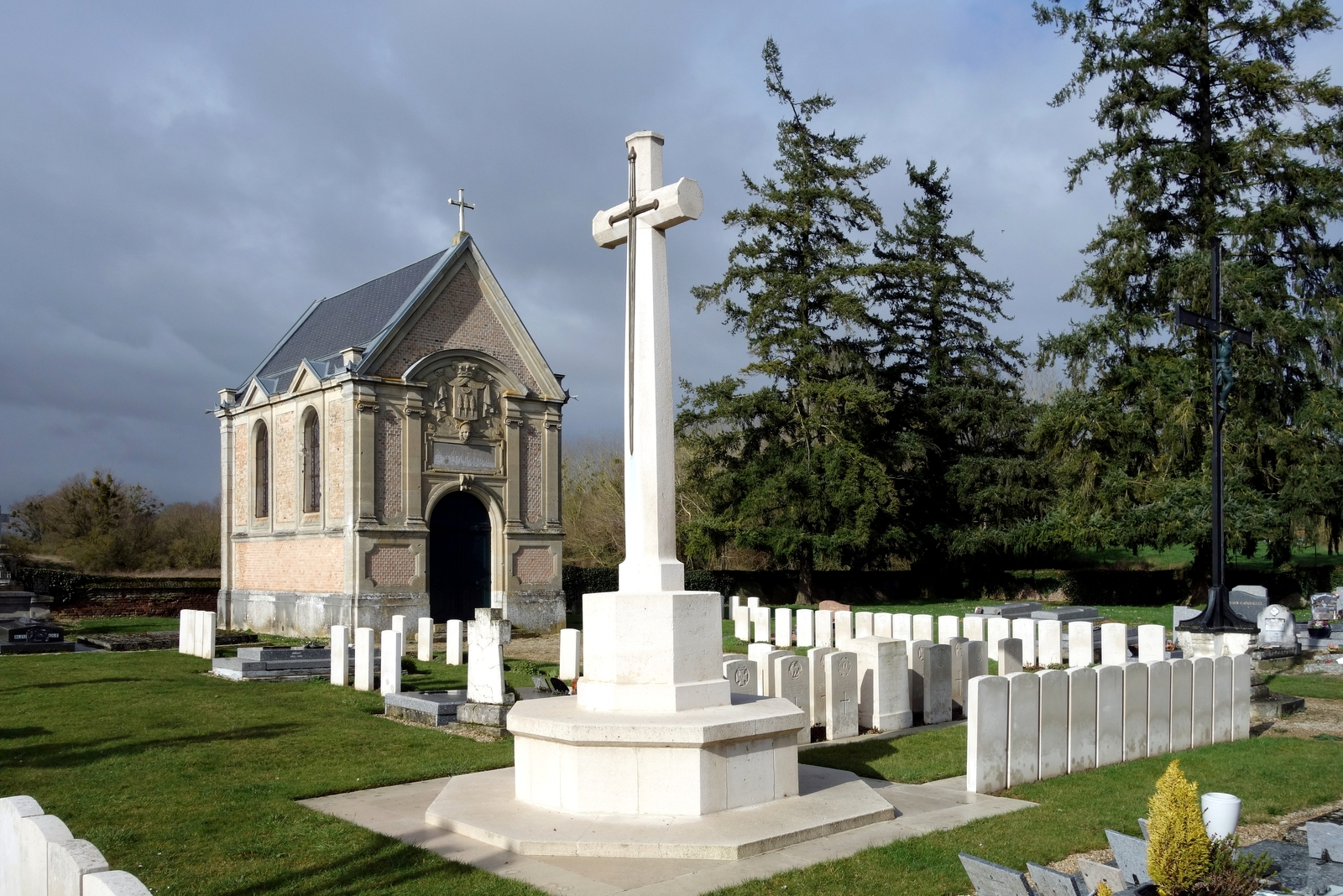 cimetiere de Foreste